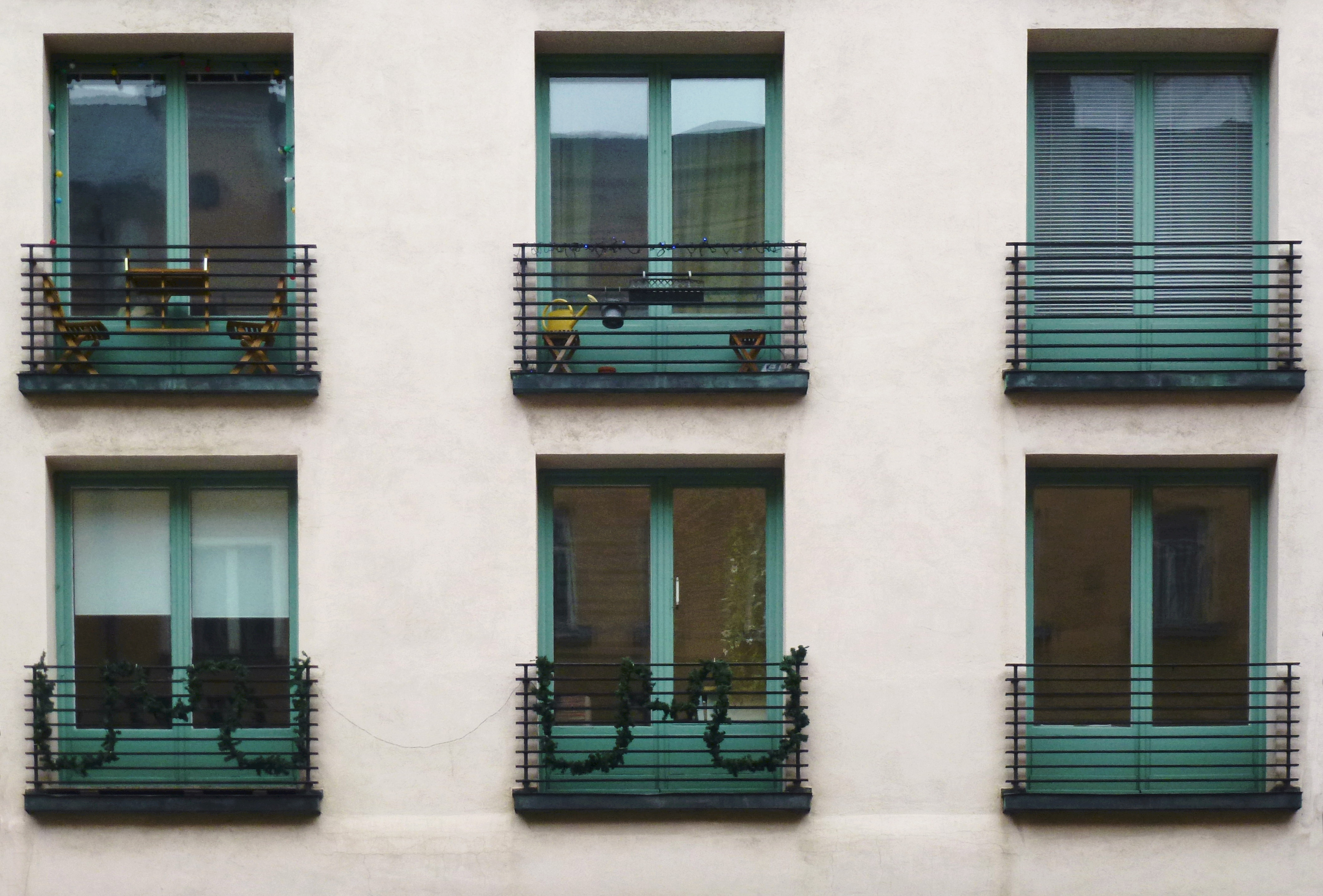 "Franska huset", Folkungagatan 65, arkitekt Paul Hedqvist